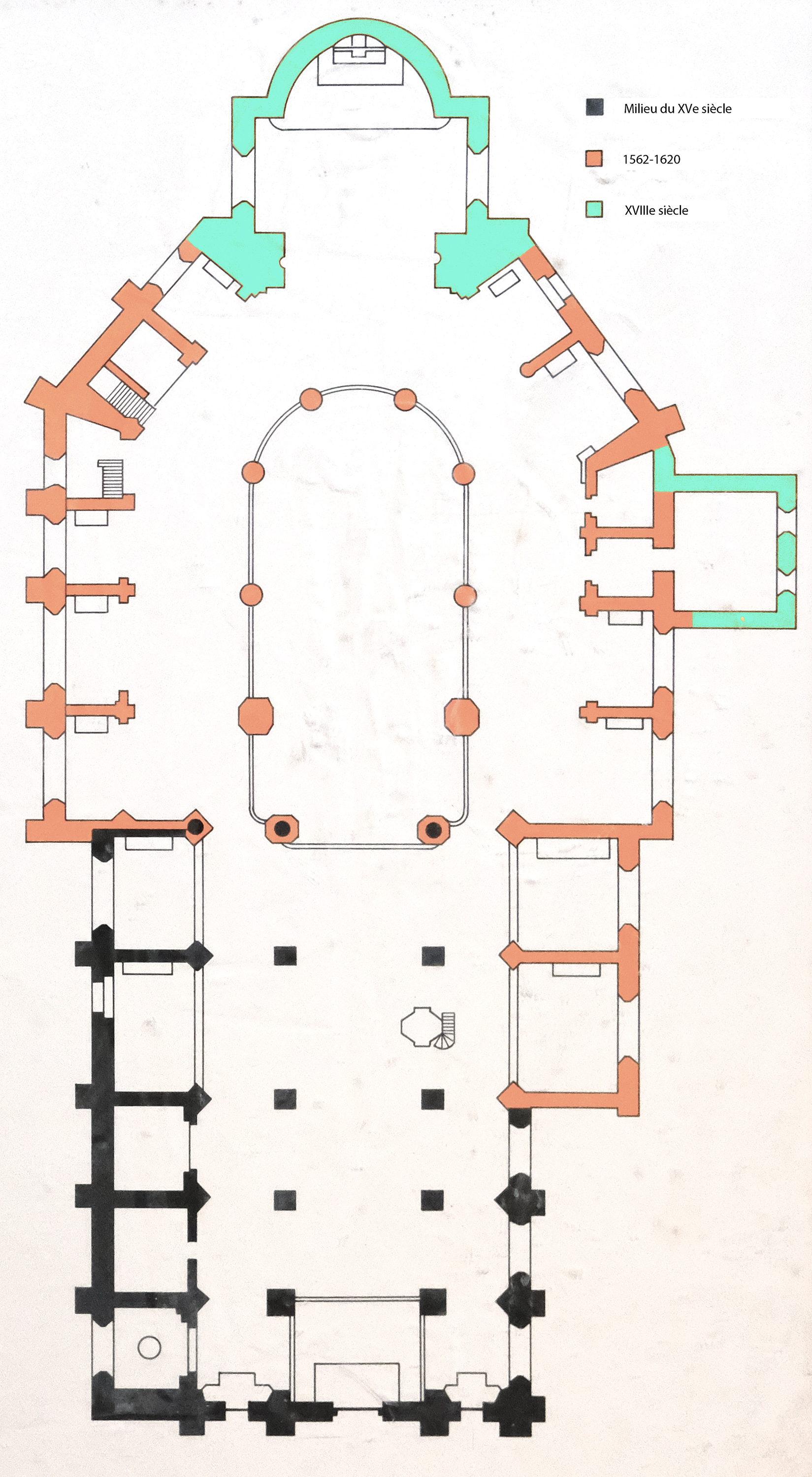 Église Saint-Médard (plan) - Paris V